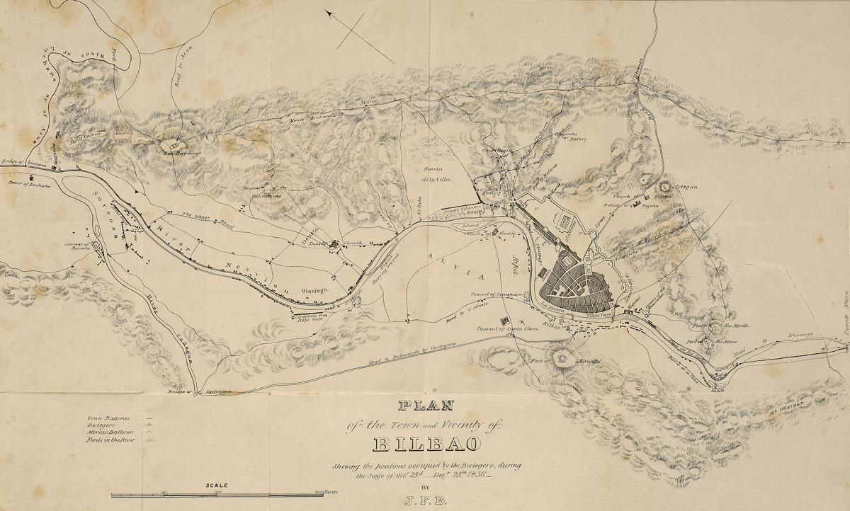 Setge de Bilbao de 1836